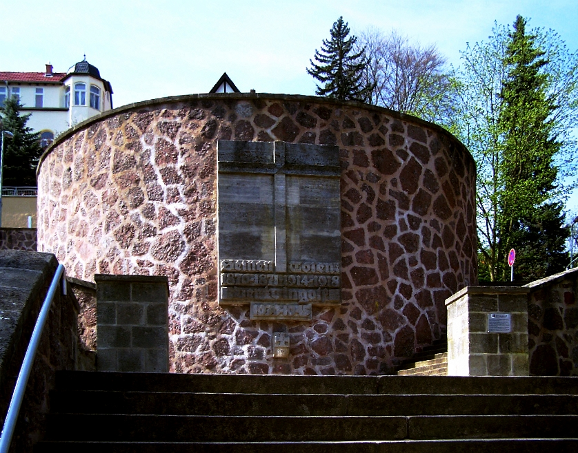 Die Treppenanlage Hainweg mit dem Wingolfdenkmal - gesehen vom oberen Pfarrberg.